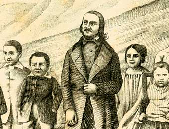 Johann Jacob Guggenbühl (1816–1863), ein Pionier der Behandlung der geistigen Behinderung, mit Kindern verschiedenen Alters aus «Cretinenanstalt». Aus: J. Guggenbühl. Die Cretinen-Heilanstalt auf dem Abend-Berg in der Schweiz, Ct. Bern, Bern und St. Gallen, 1853.